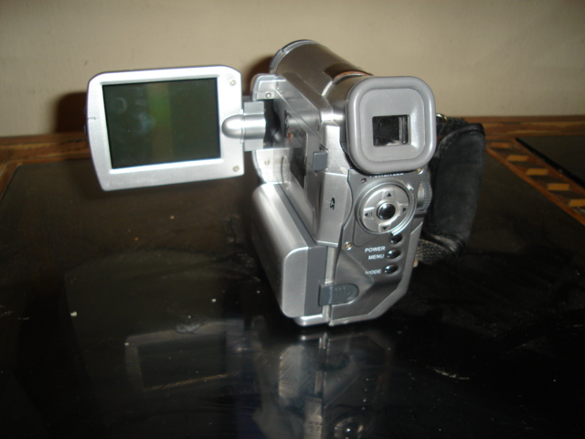 Camara Pequeña